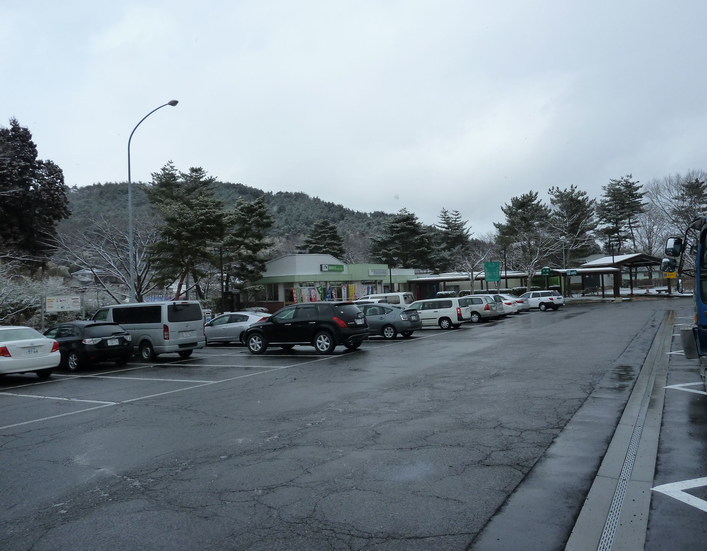 東北自動車道 福島松川パーキングエリア（下り線）